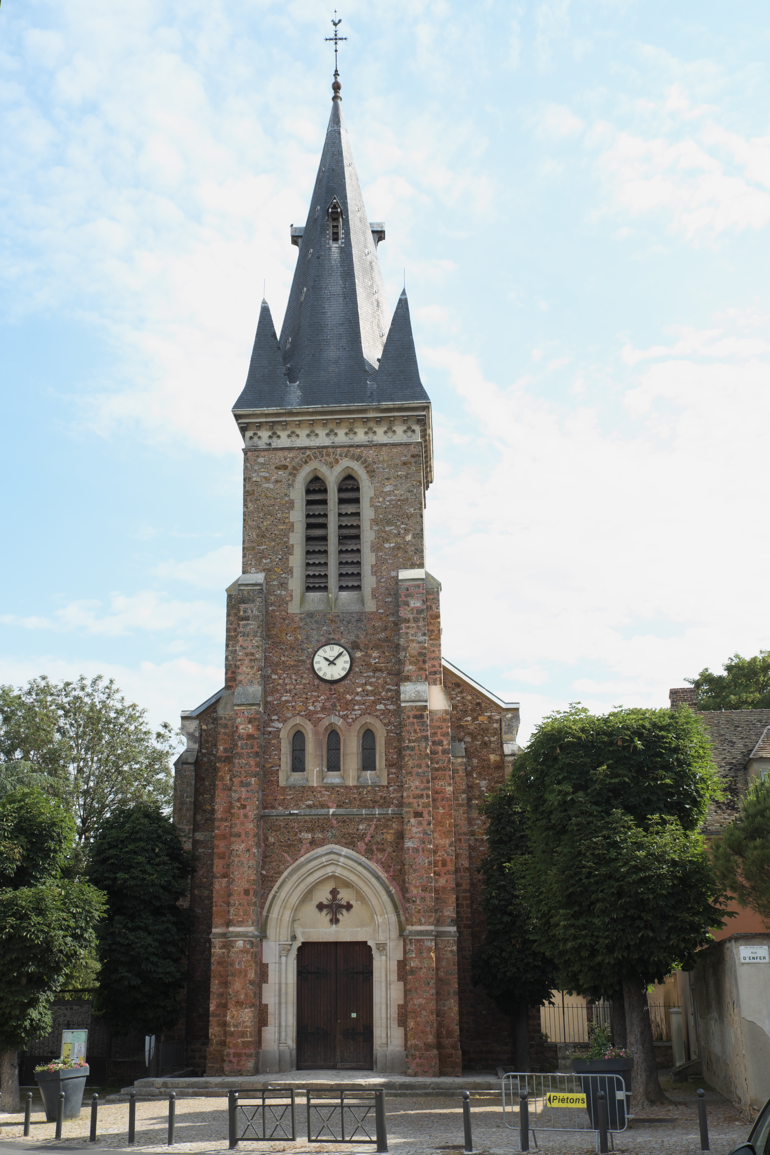 Katholische Kirche Saint-Michel in Saint-Michel-sur-Orge im Département Essonne (Region Île-de-France/Frankreich), Glockenturm